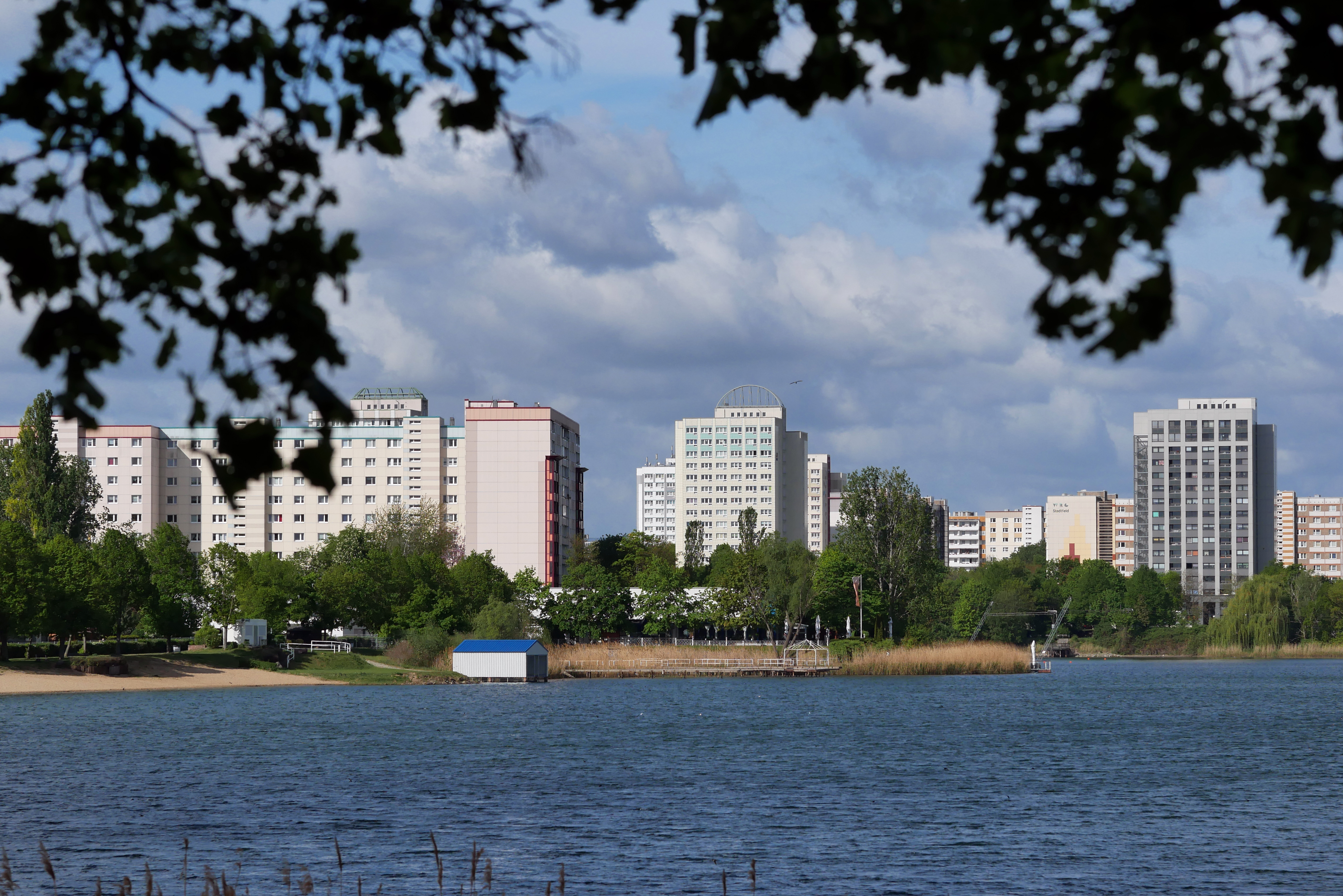 Hochhäuser am Neustädter See in Magdeburg